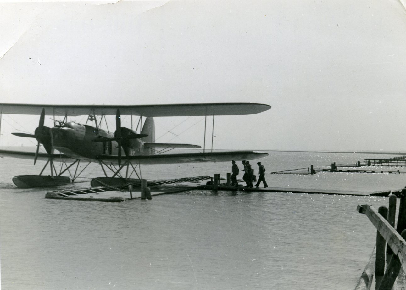 Nadat de Britse overheid medio juli 1940 had afgekondigd dat de wit gespoten HE 59’s evengoed zouden worden neergeschoten, kregen deze toestellen alsnog camouflagekleuren en militaire kentekens. Op de foto loopt een bemanning van de 6. Seenotstaffel vanaf het Zeeburgereiland over de steiger naar hun toestel. De opname dateert vermoedelijk uit de tweede helft van 1940 of 1941.